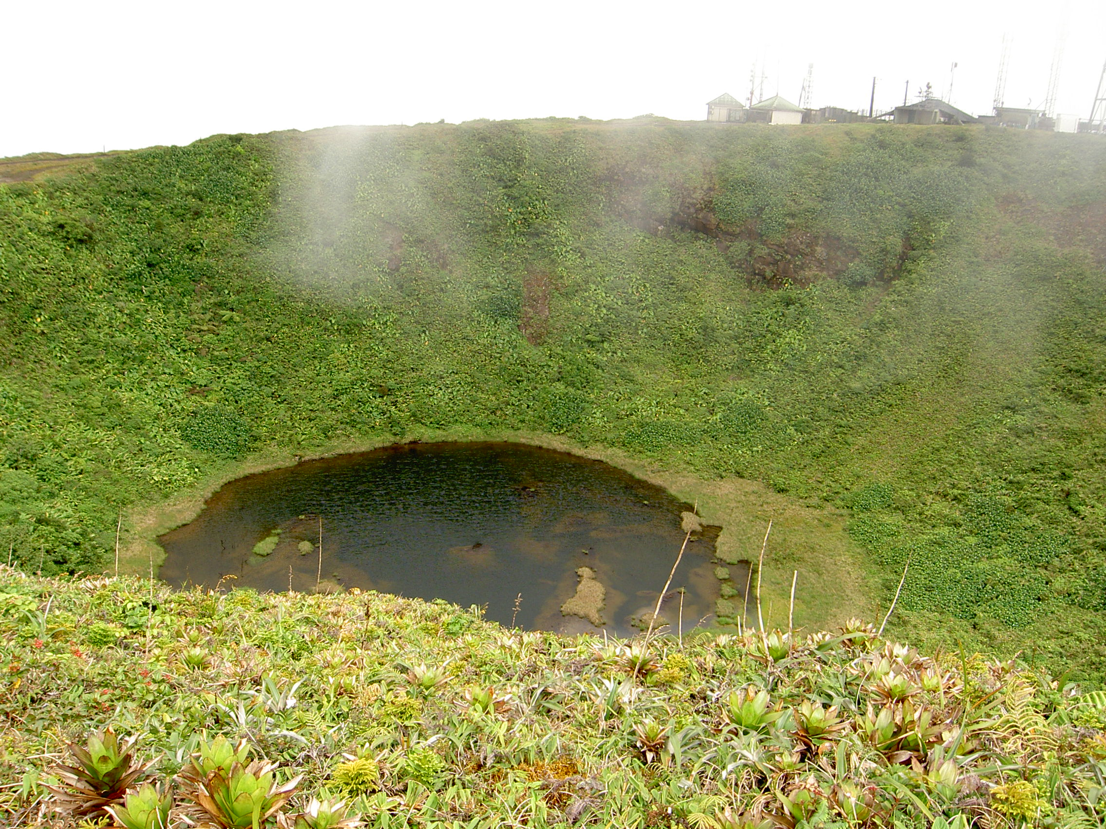 Guadeloupe - lac Flamarion - sommet de la citerne 1155m - massif de la Soufrière